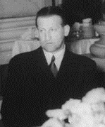 Staatssekretär Dr. Kajetan Mühlmann